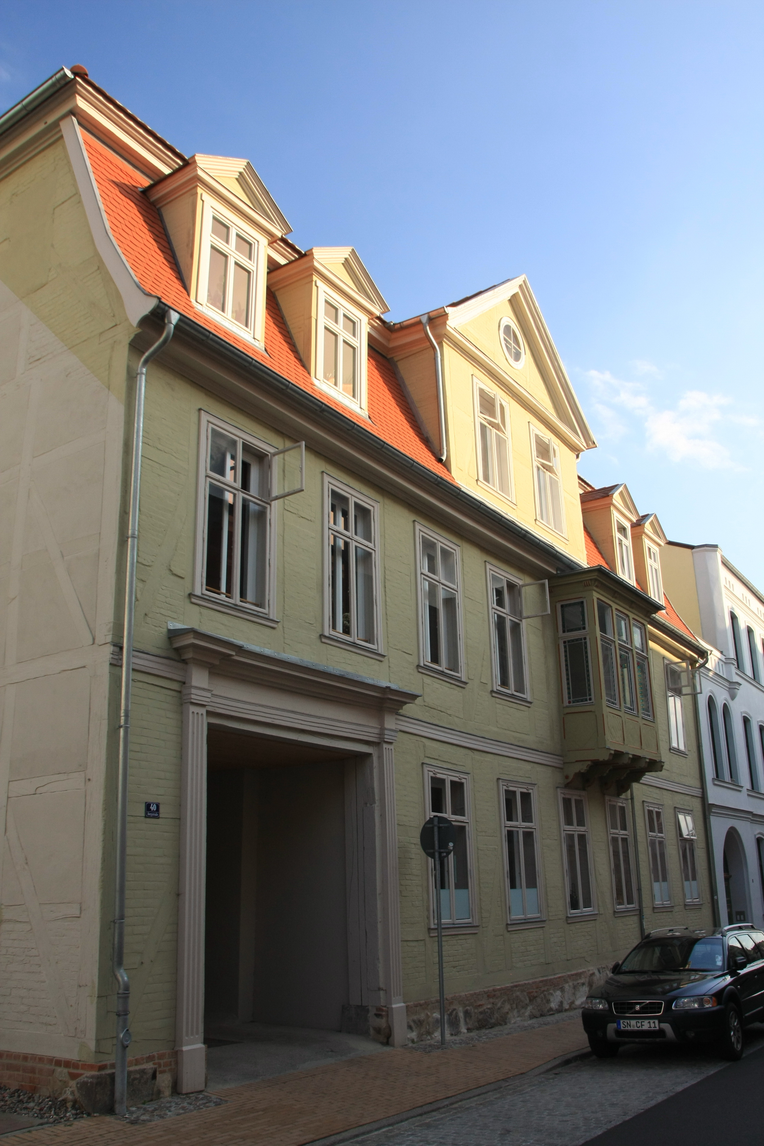 19055 Schwerin, Bergstraße 40